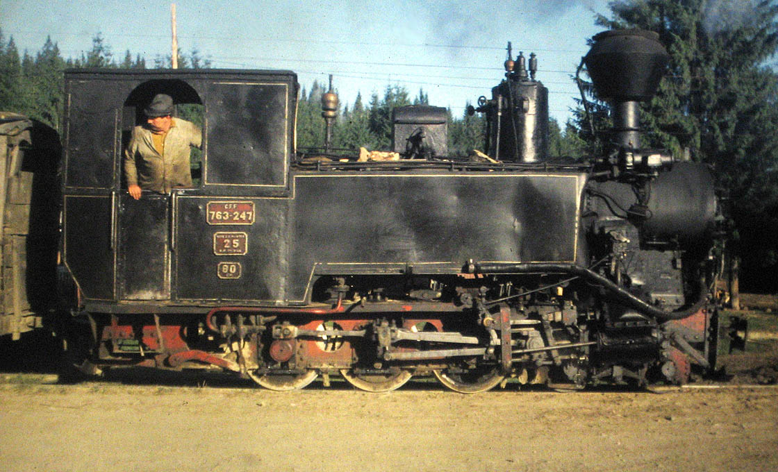 Locomotive 763.247 (Krauss) in Comandau (Romania).